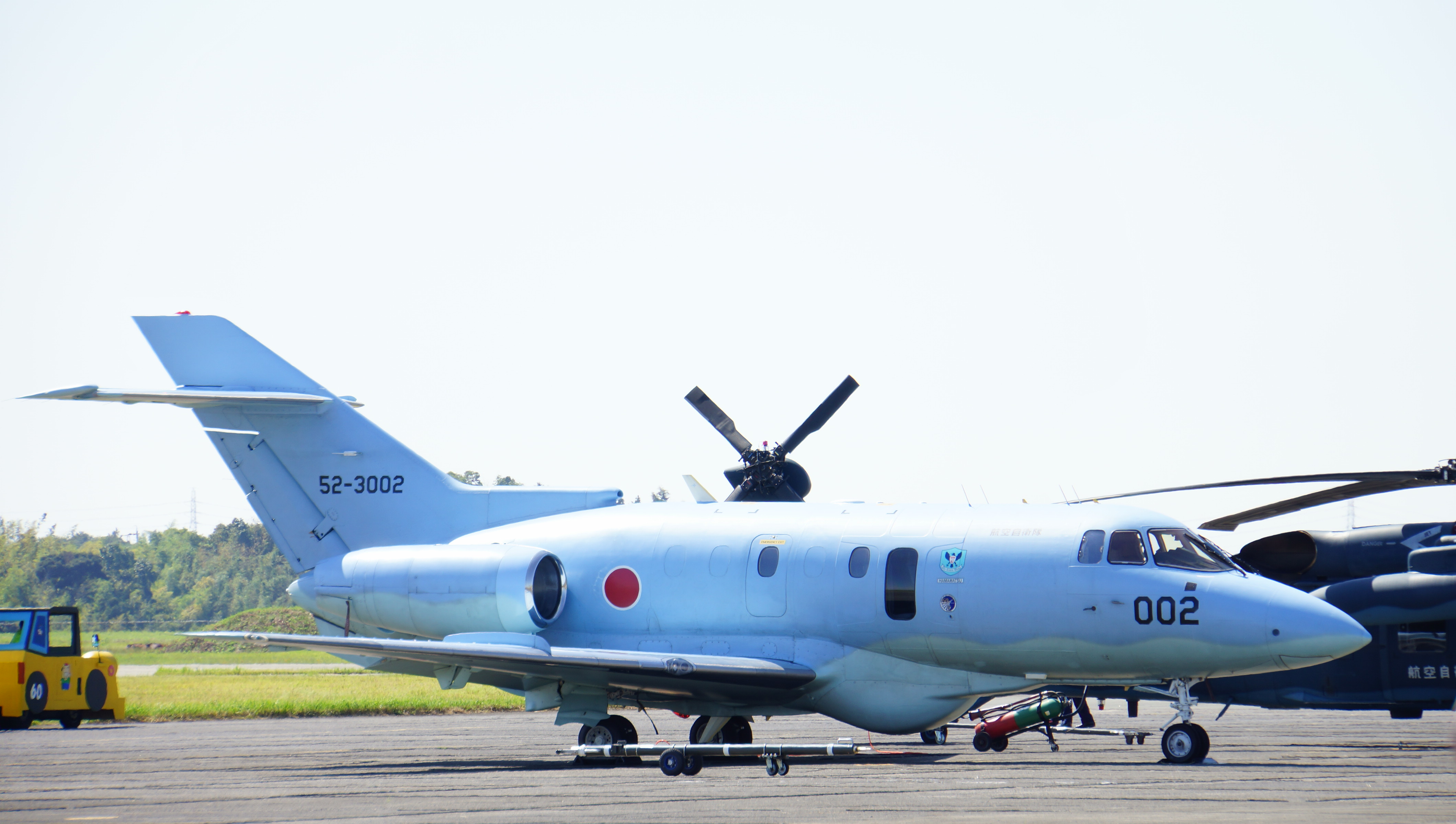 航空自衛隊 U-125A救難捜索機（52-3002号機） 右前面。2014年9月28日 浜松基地にて。